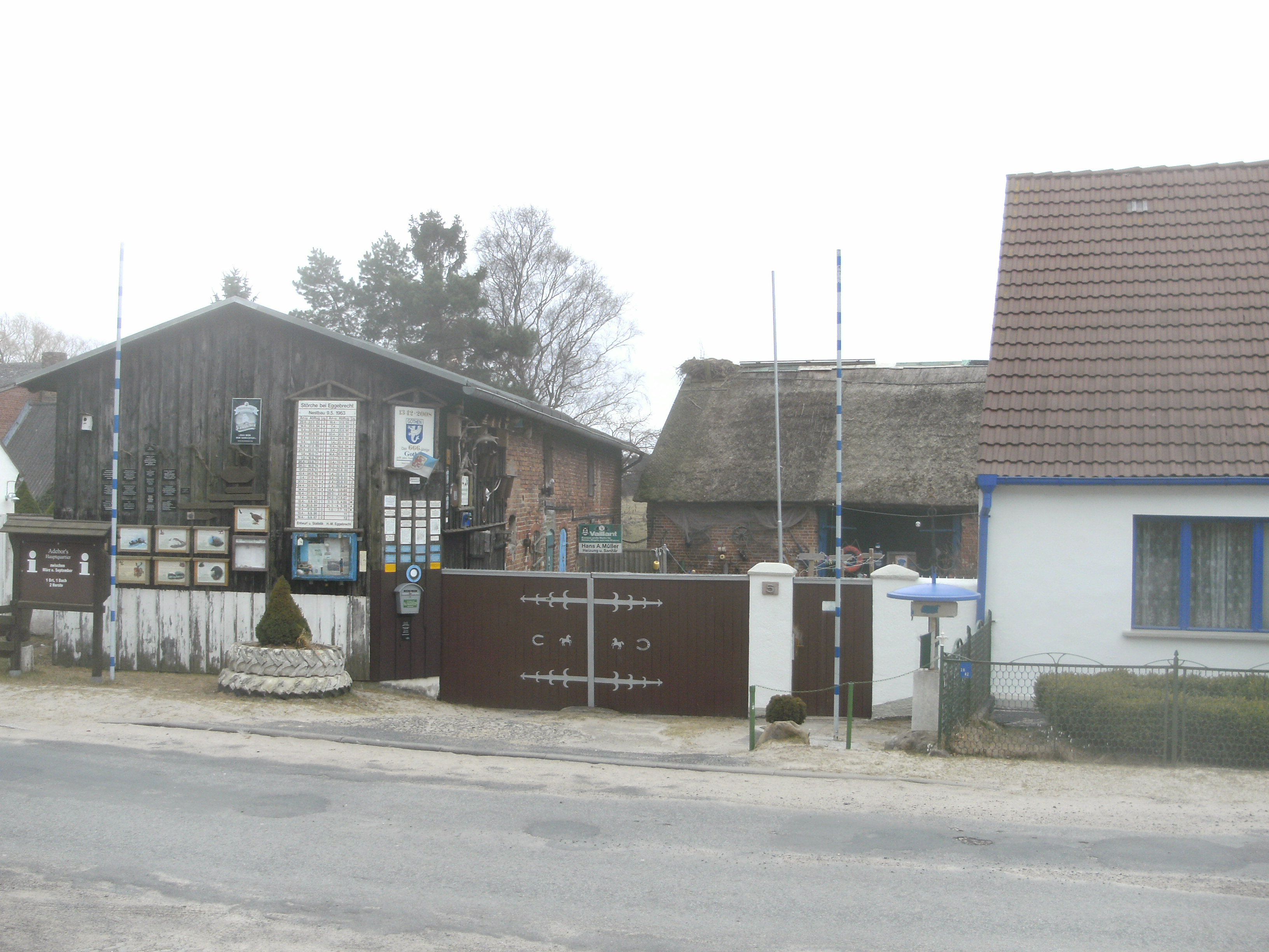 Heringsdorf, Ortsteil Gothen am Gothensee, sogenannter "Storchenhof" (Bauernhof mit Storchennest auf dem Dach)